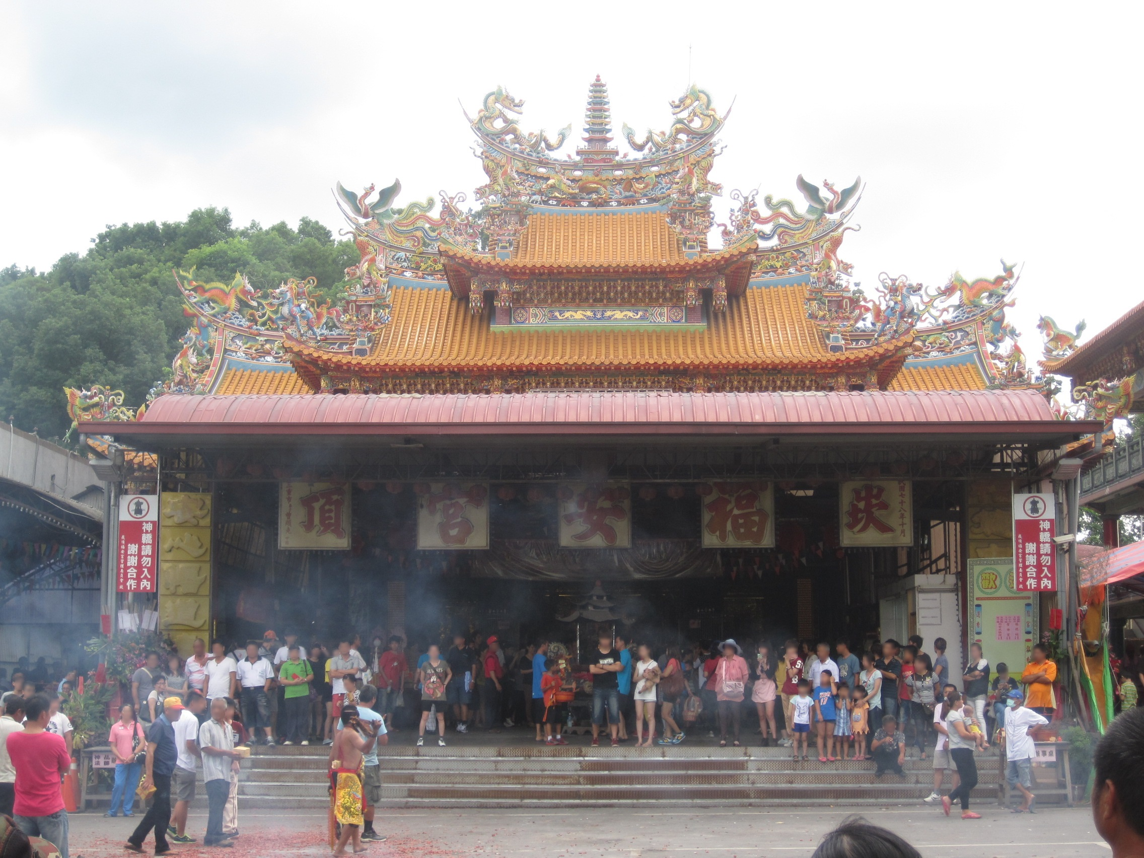 臺灣臺南市白河區的崁頂福安宮